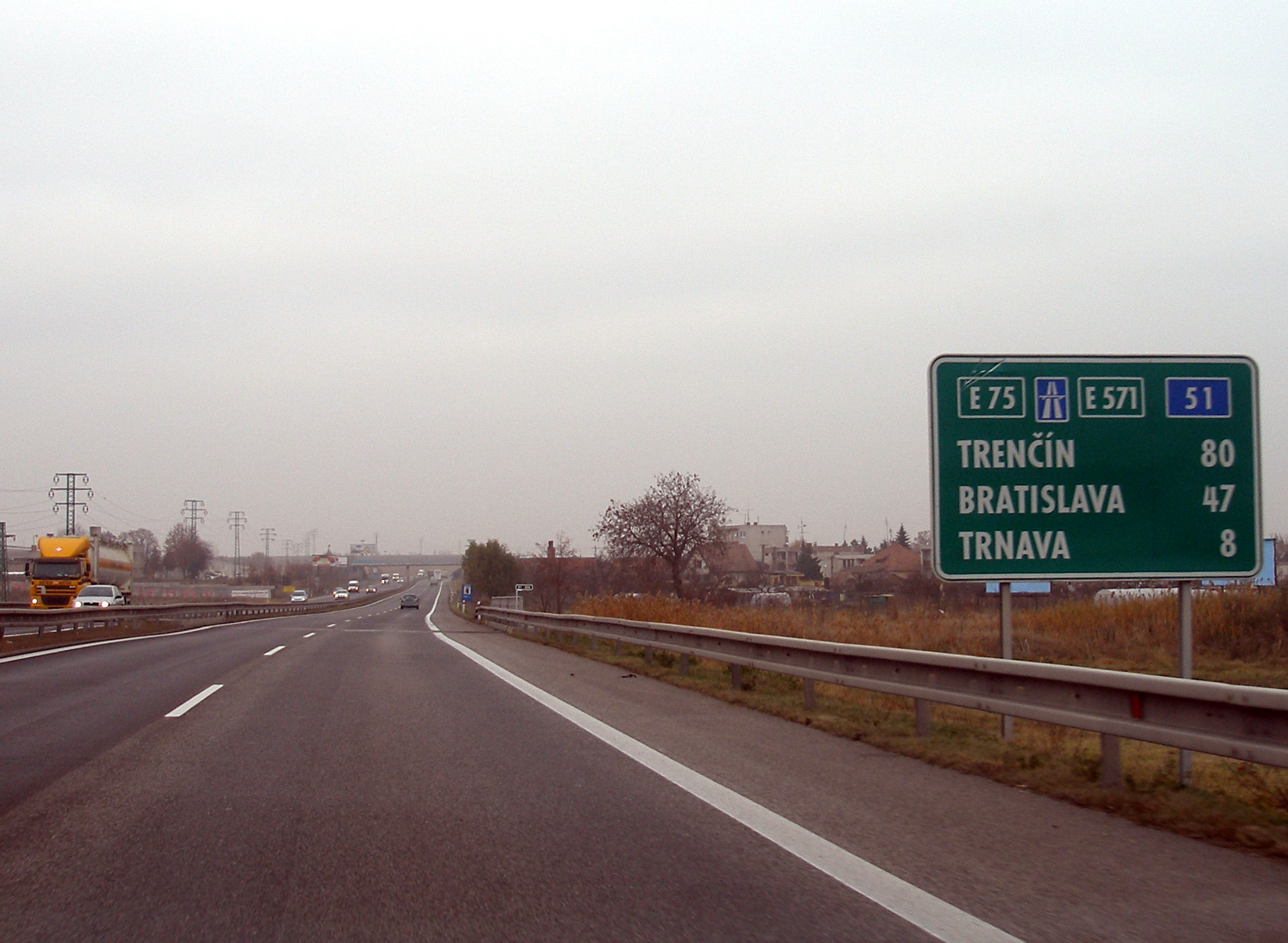 Rýchlostná komunikácia R1 PRIBINA. Úsek: Nitra-Trnava.